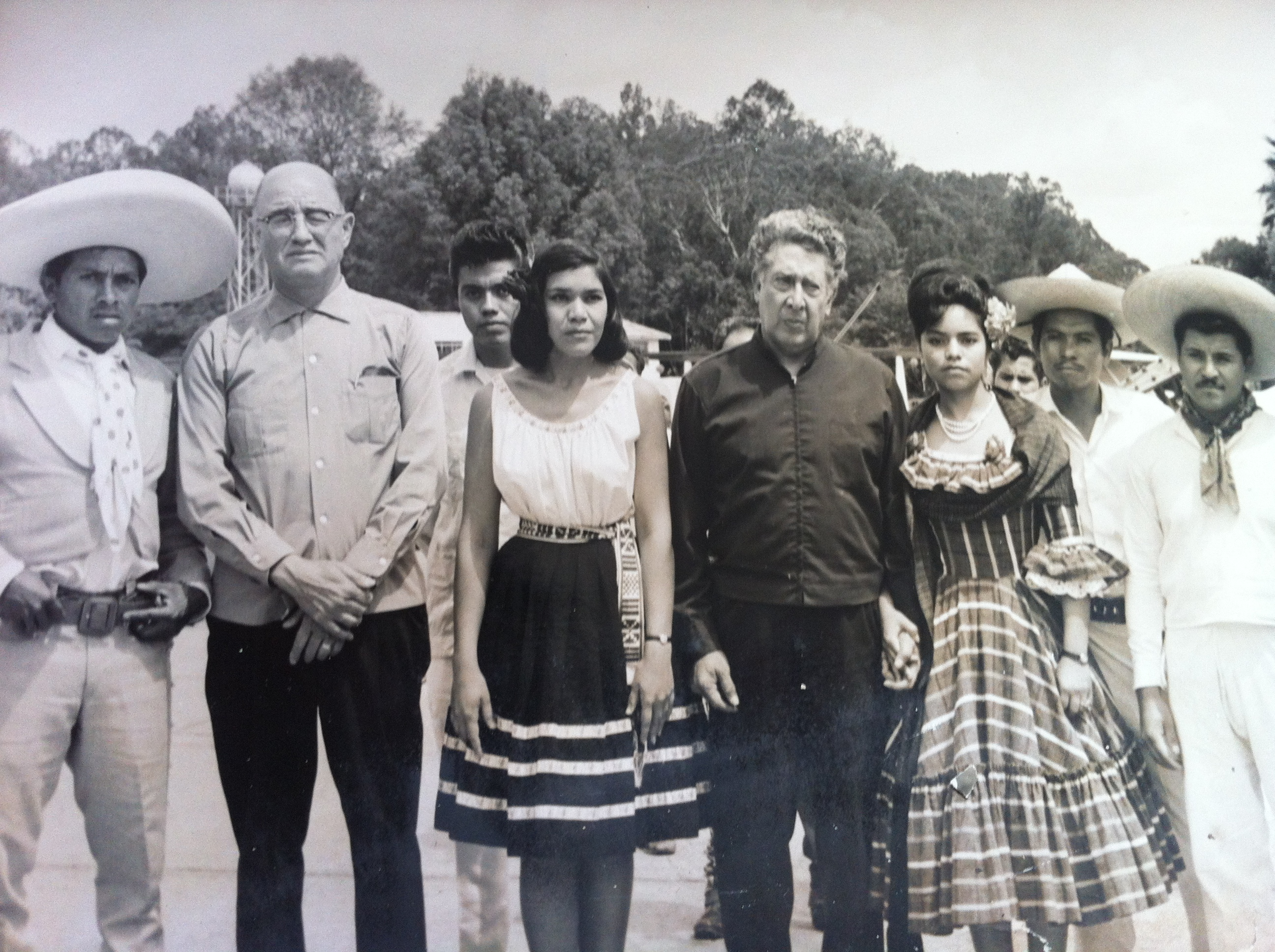 Manuel Suarez y Siqueiros